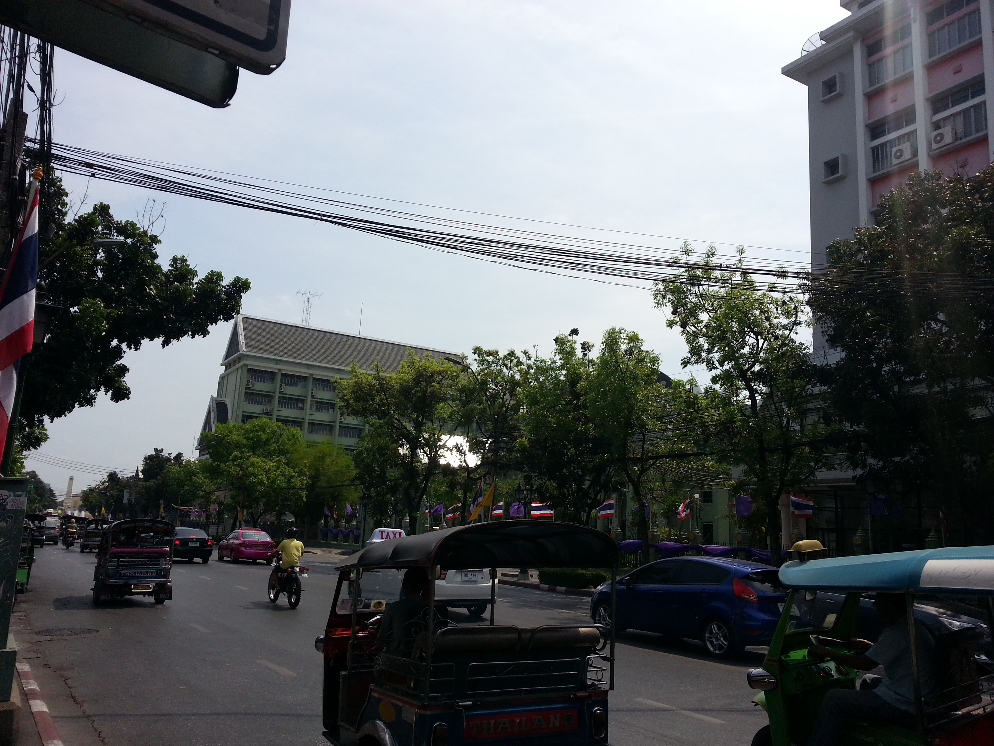 Wang Burapha Phirom, Phra Nakhon, Bangkok, Thailand